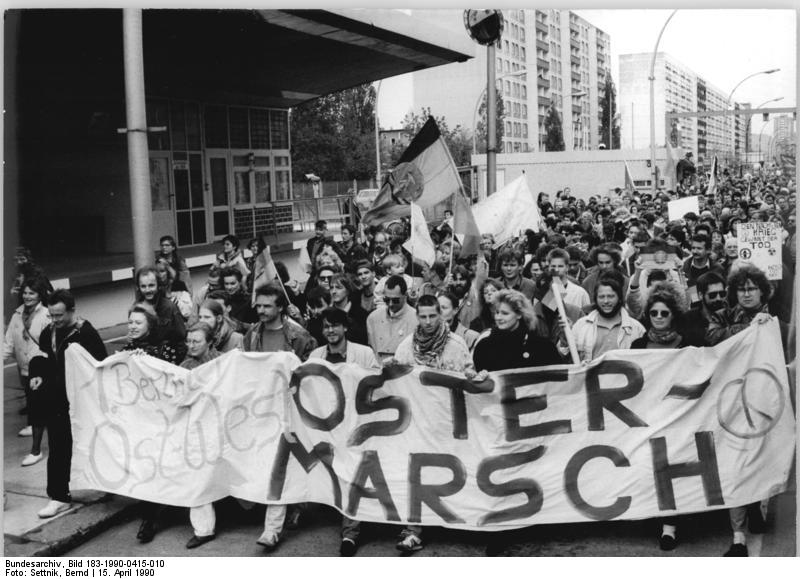 ADN-Settnik/ 15.4.90-Berlin: Zum ersten gemeinsamen Ostermarsch vereinigten sich rund 15000 Teilnehmer aus beiden Teilen der Stadt. Nach einer Auftaktkundgebung im Monbijoupark im Stadtbezirk Mitte ging es über Heinrich-Heine-Strasse (unser Foto) zum Hermann-Platz im Westberliner Stadtbezirk Neukölln, wo der Ostermarsch mit einer Kundgebeung seinen Abschlus fand.